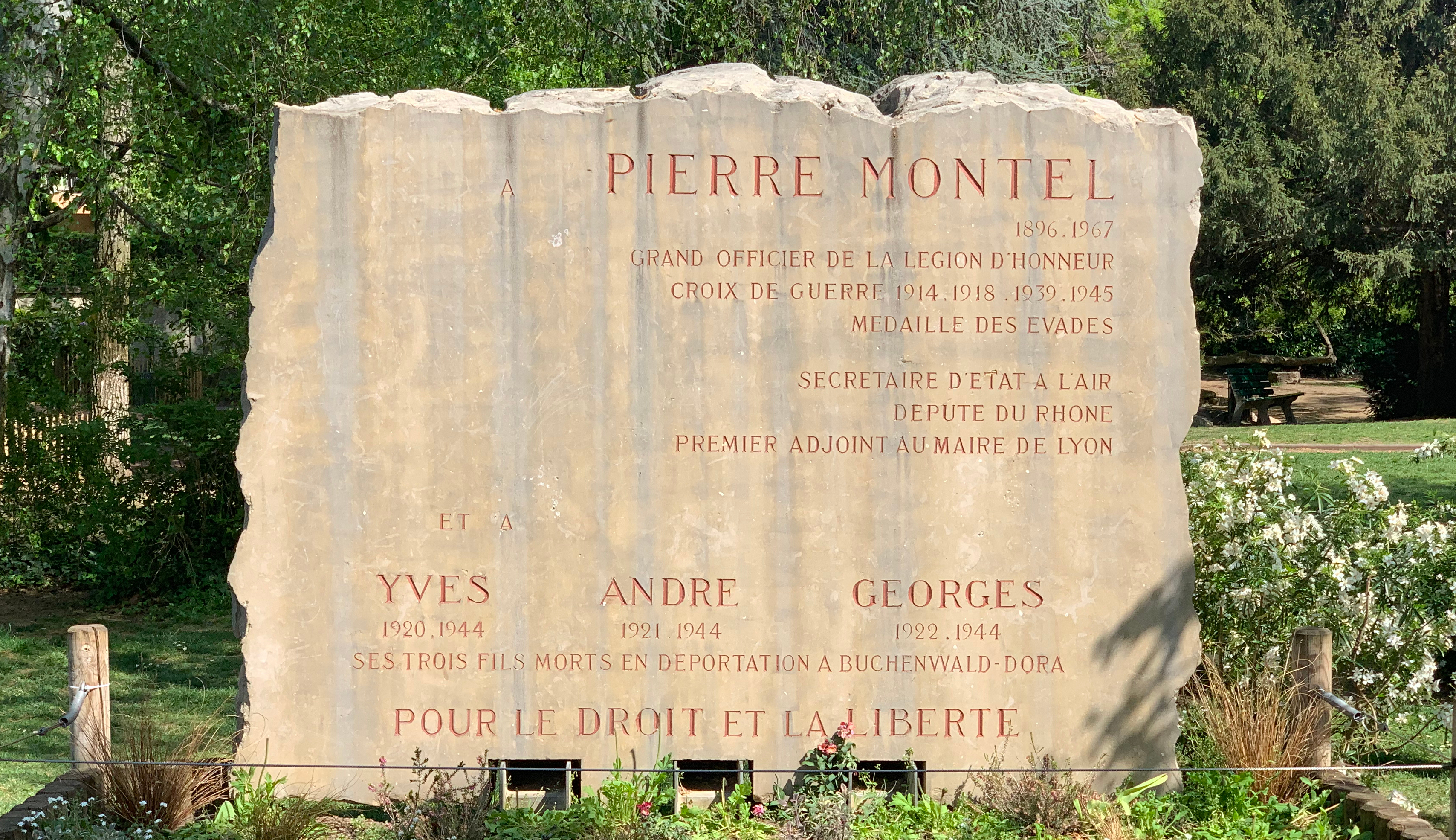 Parc Montel (Lyon) en avril 2019.